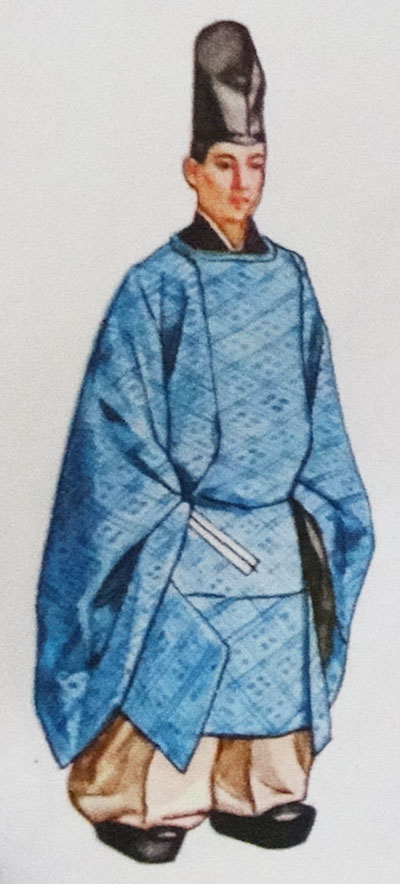 直衣 平安期以来の公家の平常服